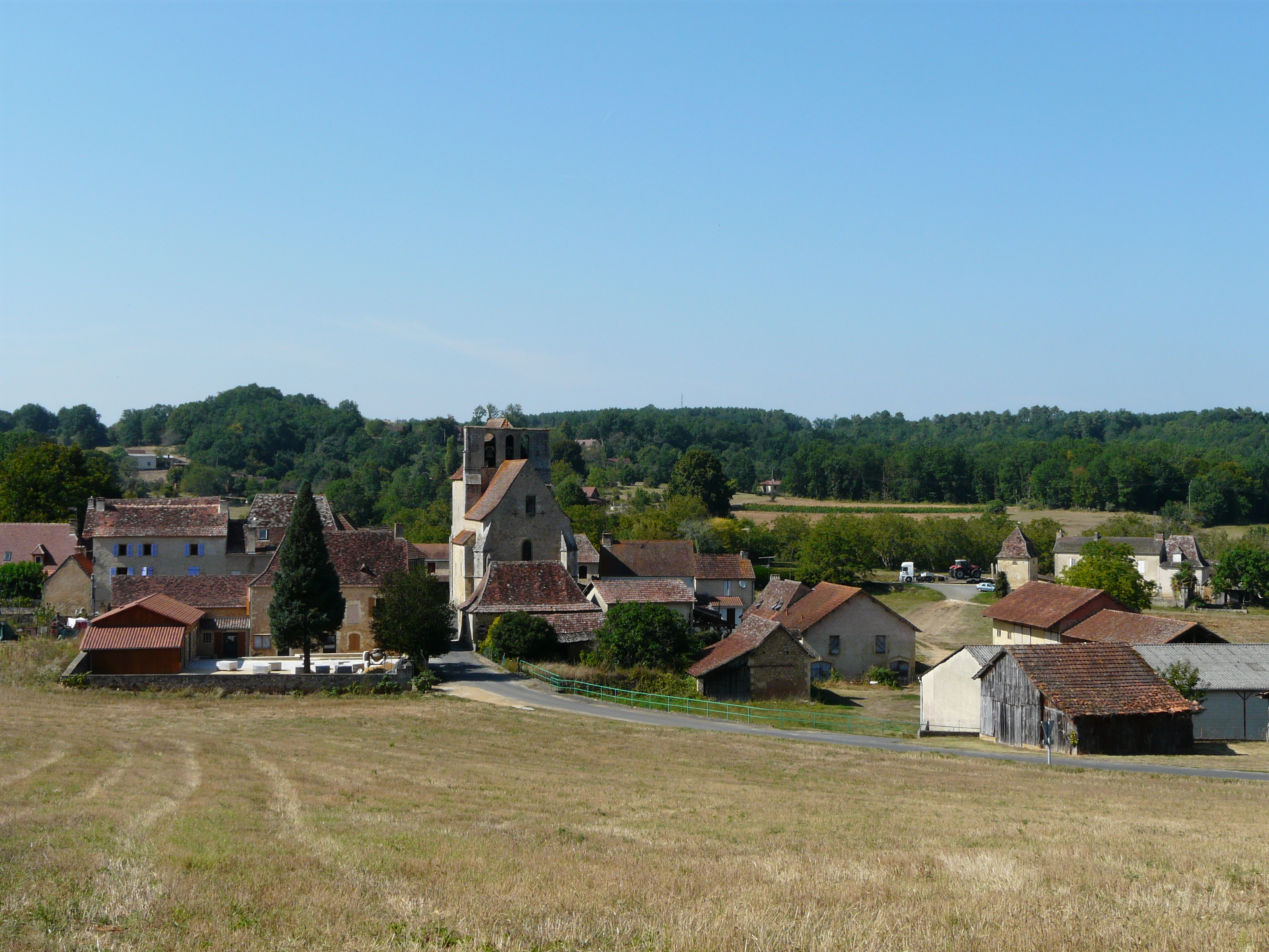 Le village de Mauzens, Mauzens-et-Miremont, Dordogne, France.